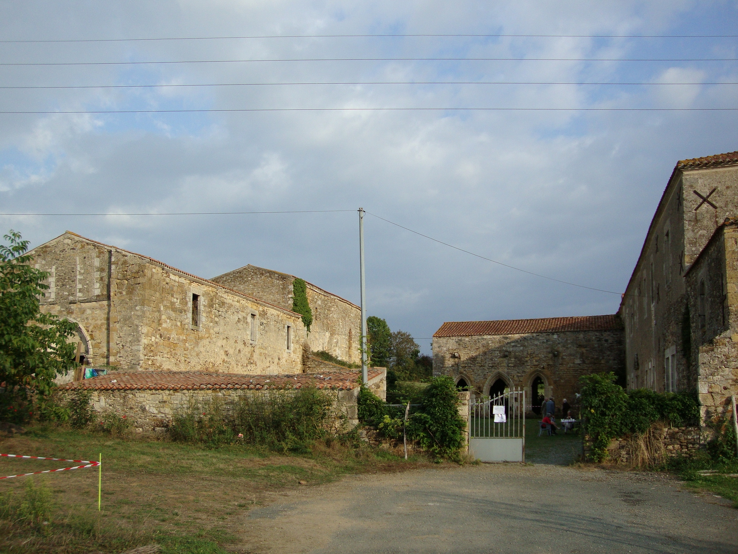 Abbaye de Trizay (Vendée, France), (Inscrite, 1989)